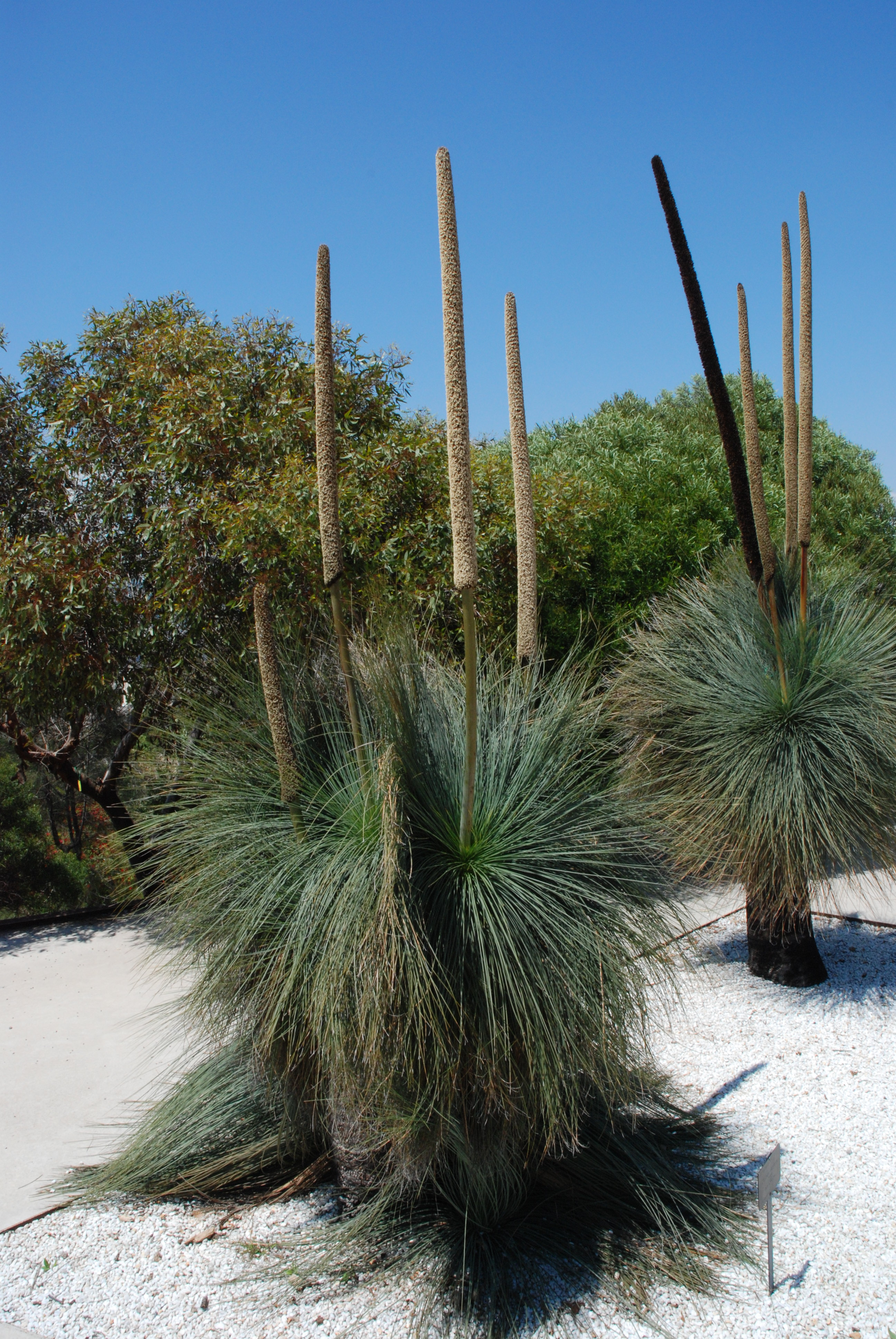 Xanthorrhoea in de botanische tuin van Barcelona te Spanje